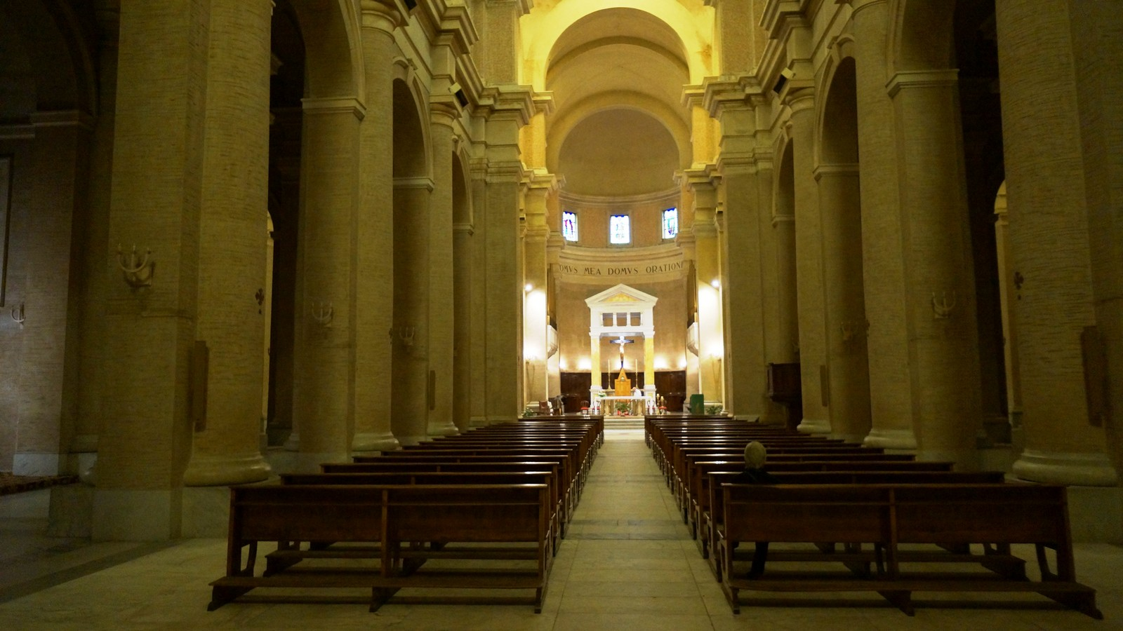 La Cattedrale di Avezzano interno